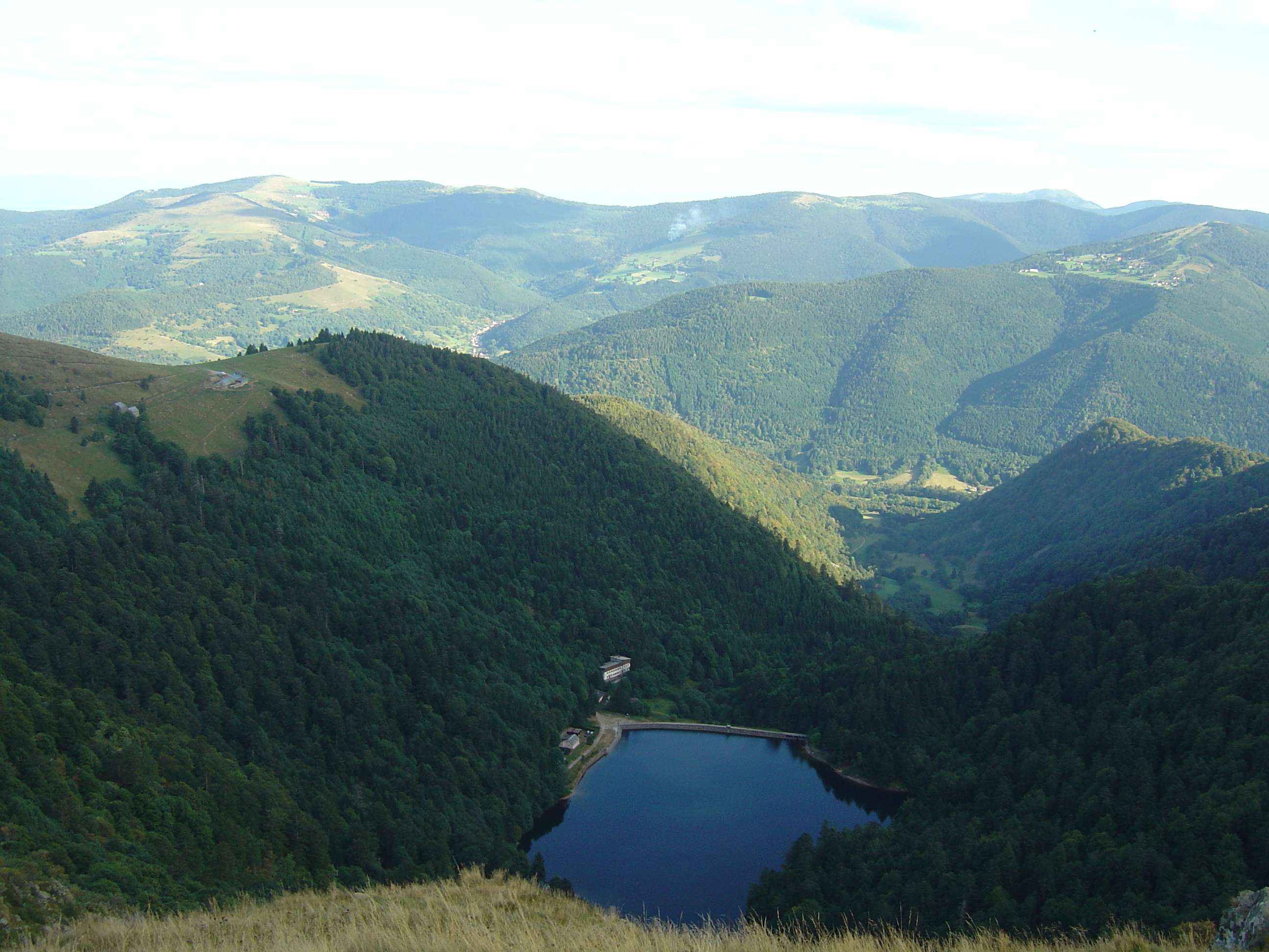 Lac de Schissrothried au pied du Hohneck et Petit Ballon au fond